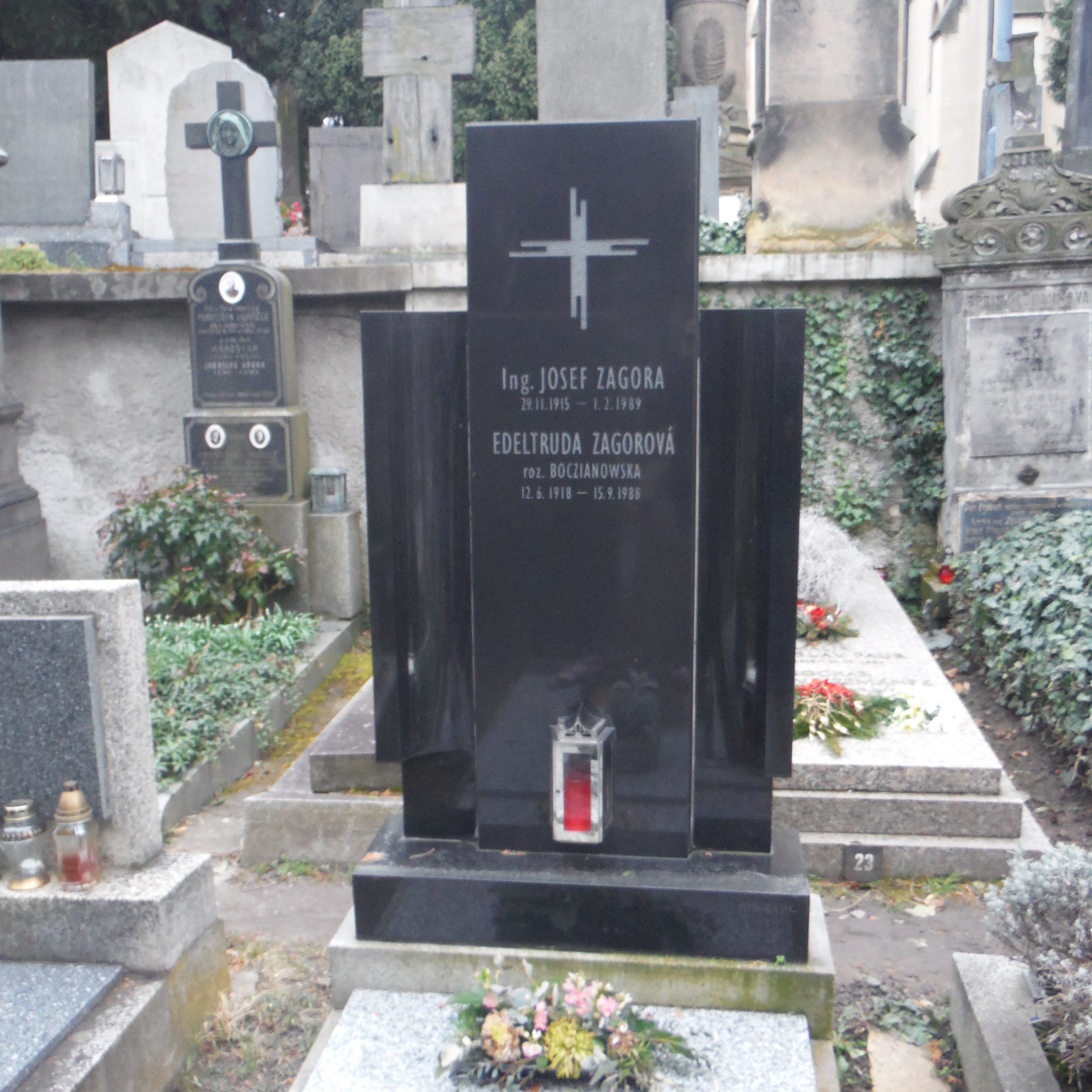 hrob